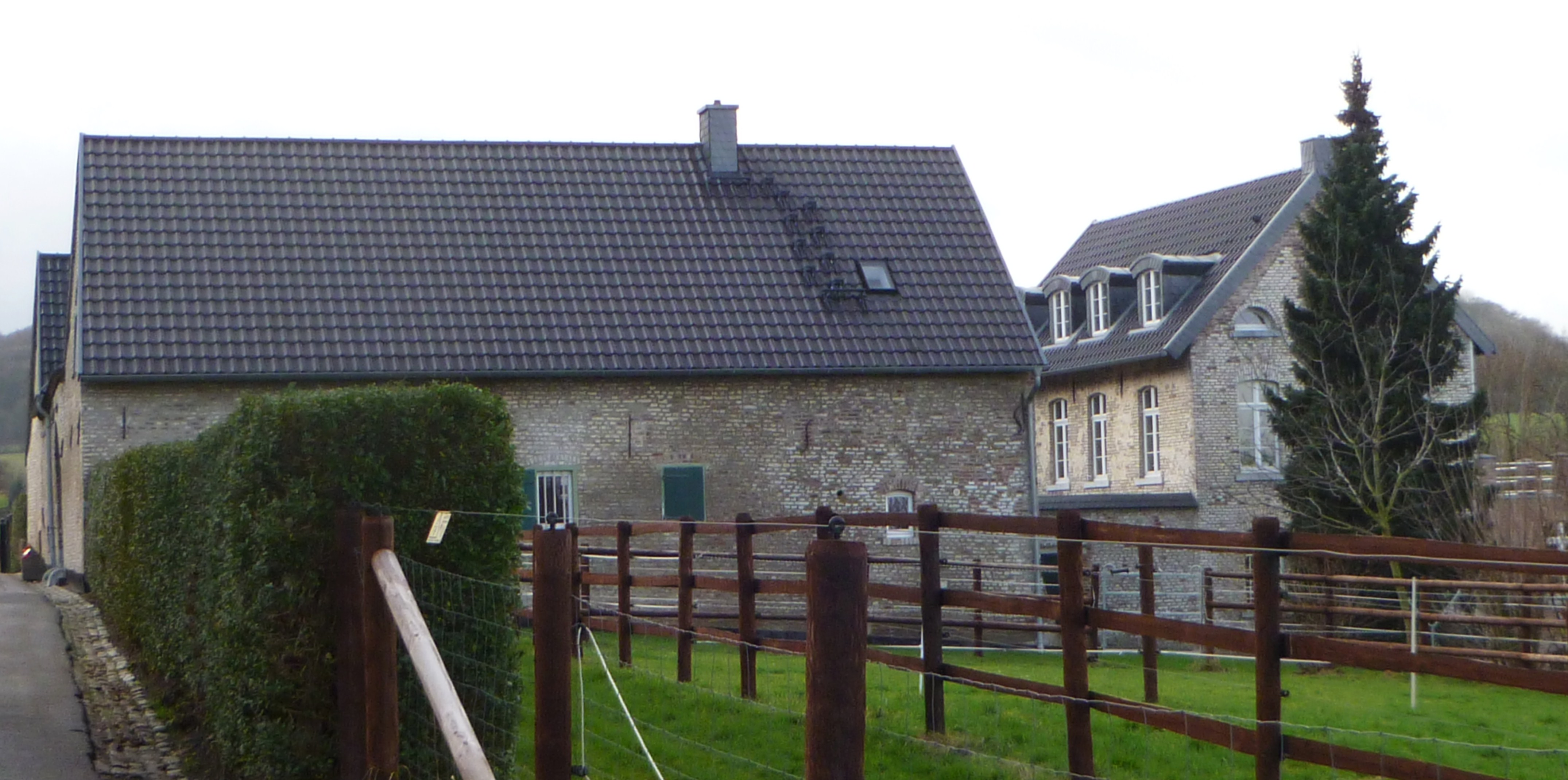 Baudenkmal in Aachen-Mitte